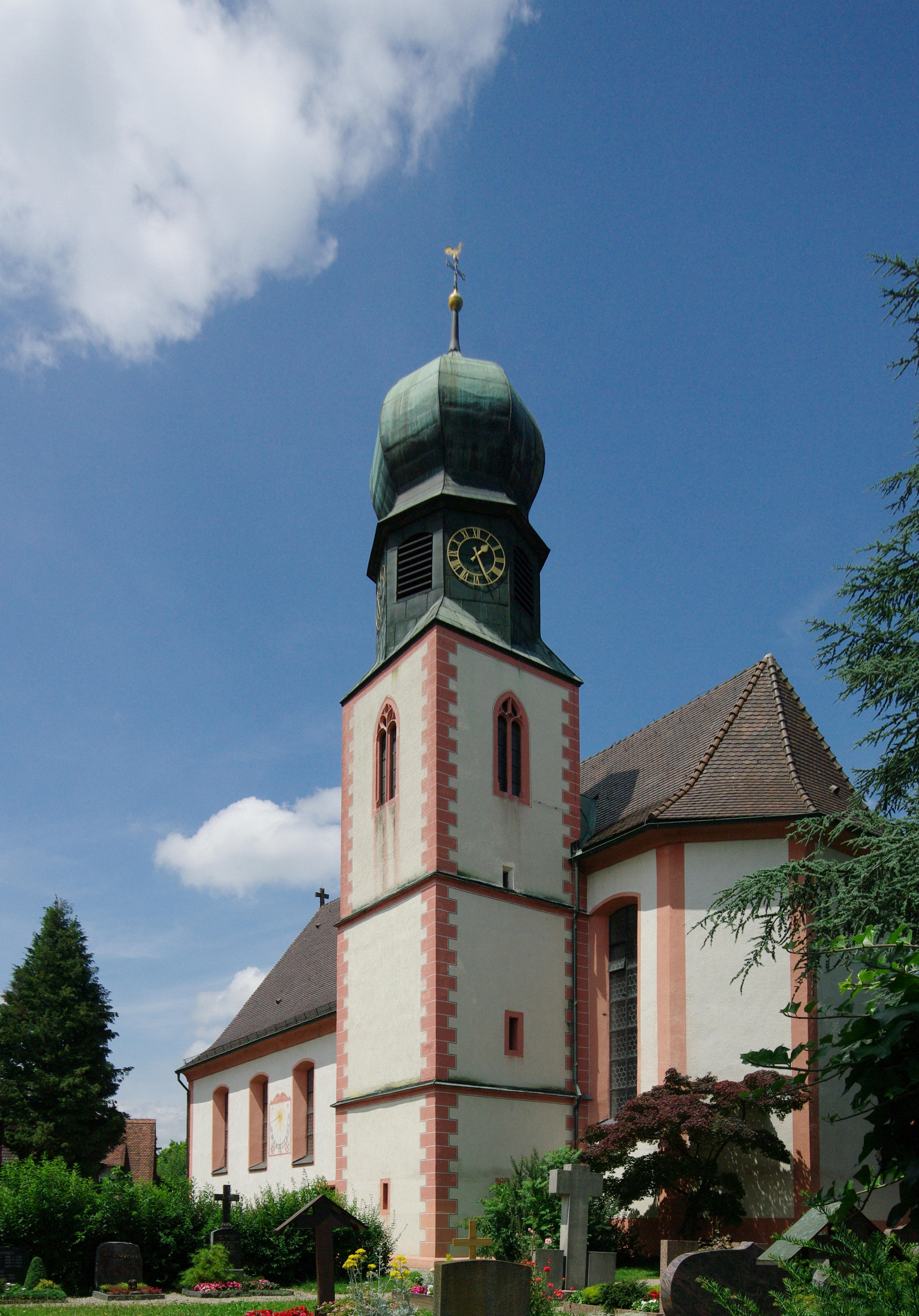 Blick auf den Kirchturm